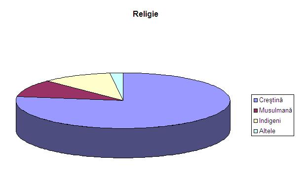 Diagrama cu religia Kenyei.